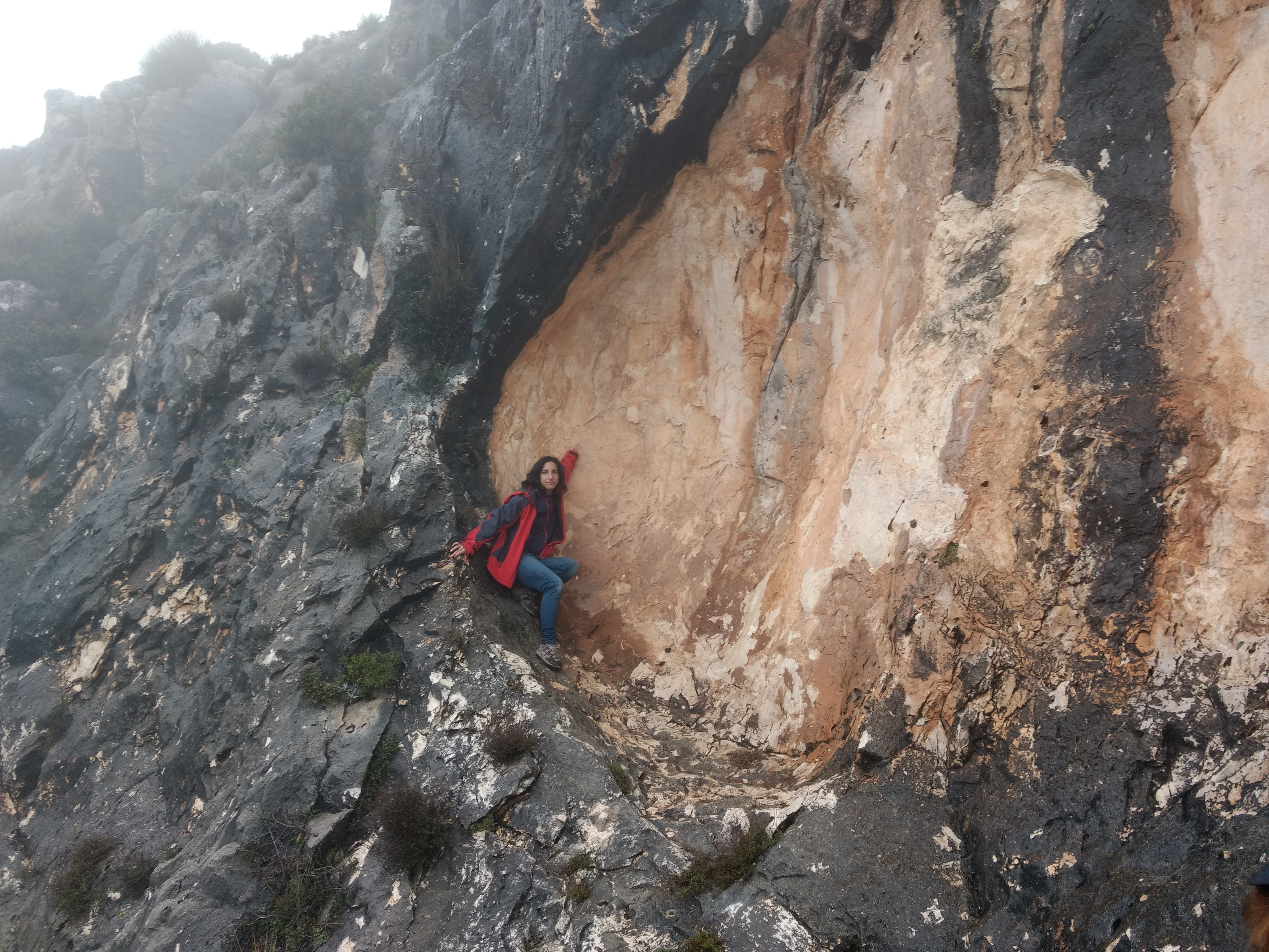 Maite nos señala el lugar exacto del motivo rupestre denominado popularmente «Indalo».